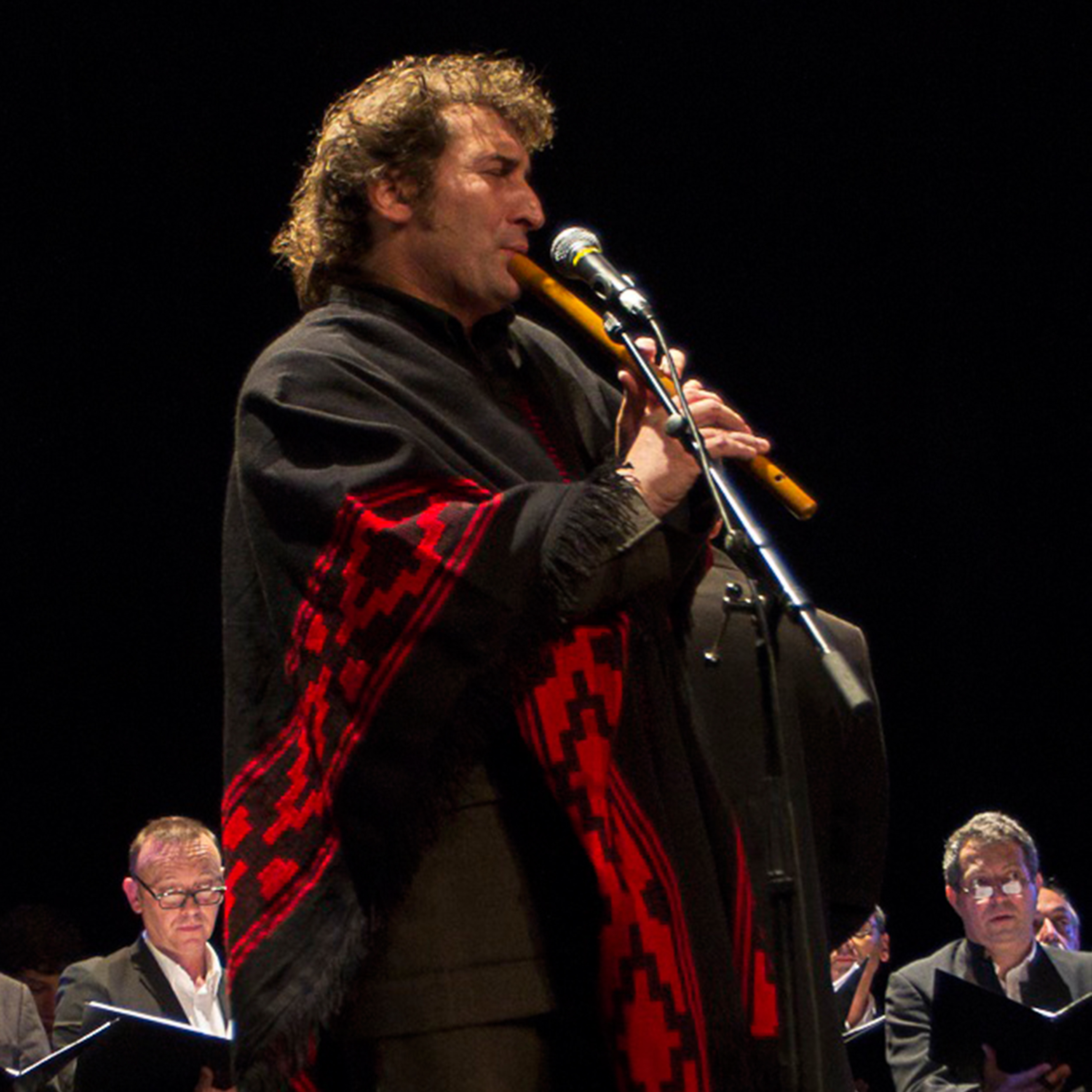 Luis Rigou à la quena